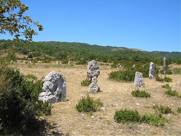 CROMLECH DE PEYRARINES, CAUSSE DE BLANDAS, département du GARD, région LANGUEDOC, FRANCE Ce cercle de pierres préhistoriques a un diamètre de plus de 120 mètres et compte plus d'une cinquantaine de menhirs dressés. Il est implanté à proximité immédiate de plusieurs menhirs et dolmens. Source : Bruno MARC [1] le site des Mégalithes des Cévennes et des Causses du Gard Licence : GFDL Bruno MARC